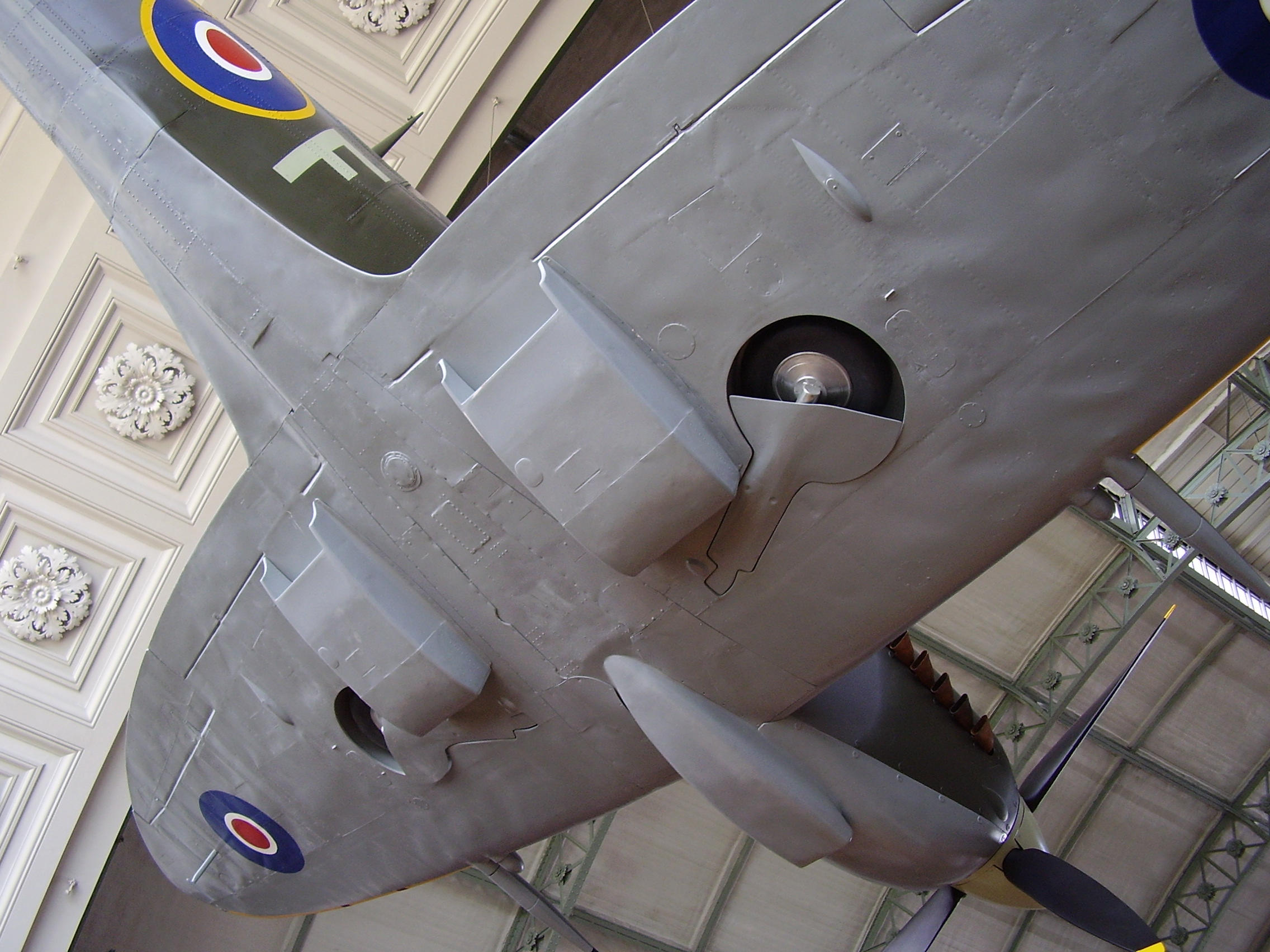 Royal Military Museum Brussels, Musée Royal de l'Armée, Koninklijk Museum van het Leger en de Krijgsgeschiedenis